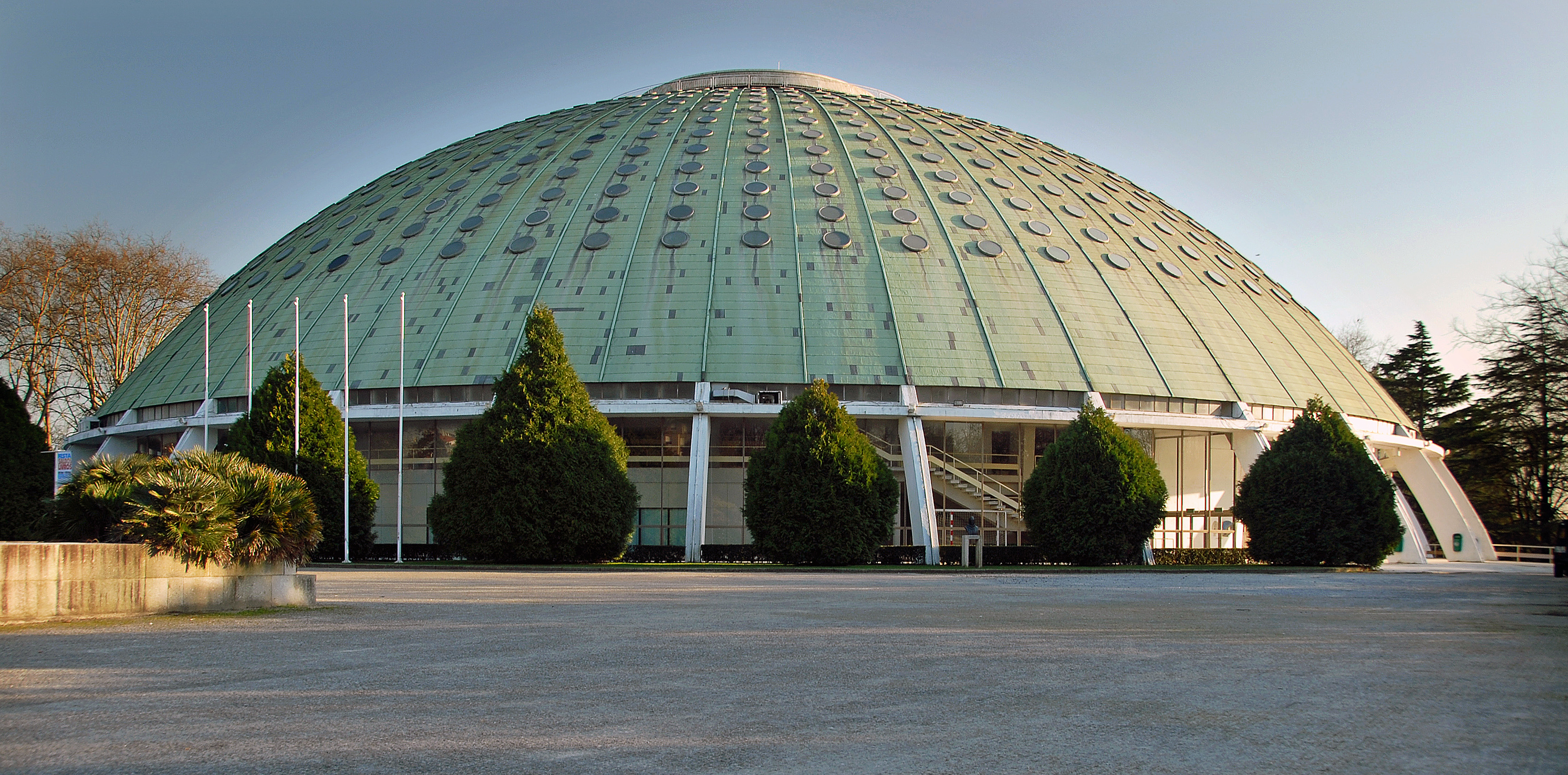 Pavilhão Rosa Mota ou Pavilhão dos Desportos no Jardim do Palácio de Cristal This file was uploaded for Wiki Loves Monuments in Portugal with the unique identifier 330449.